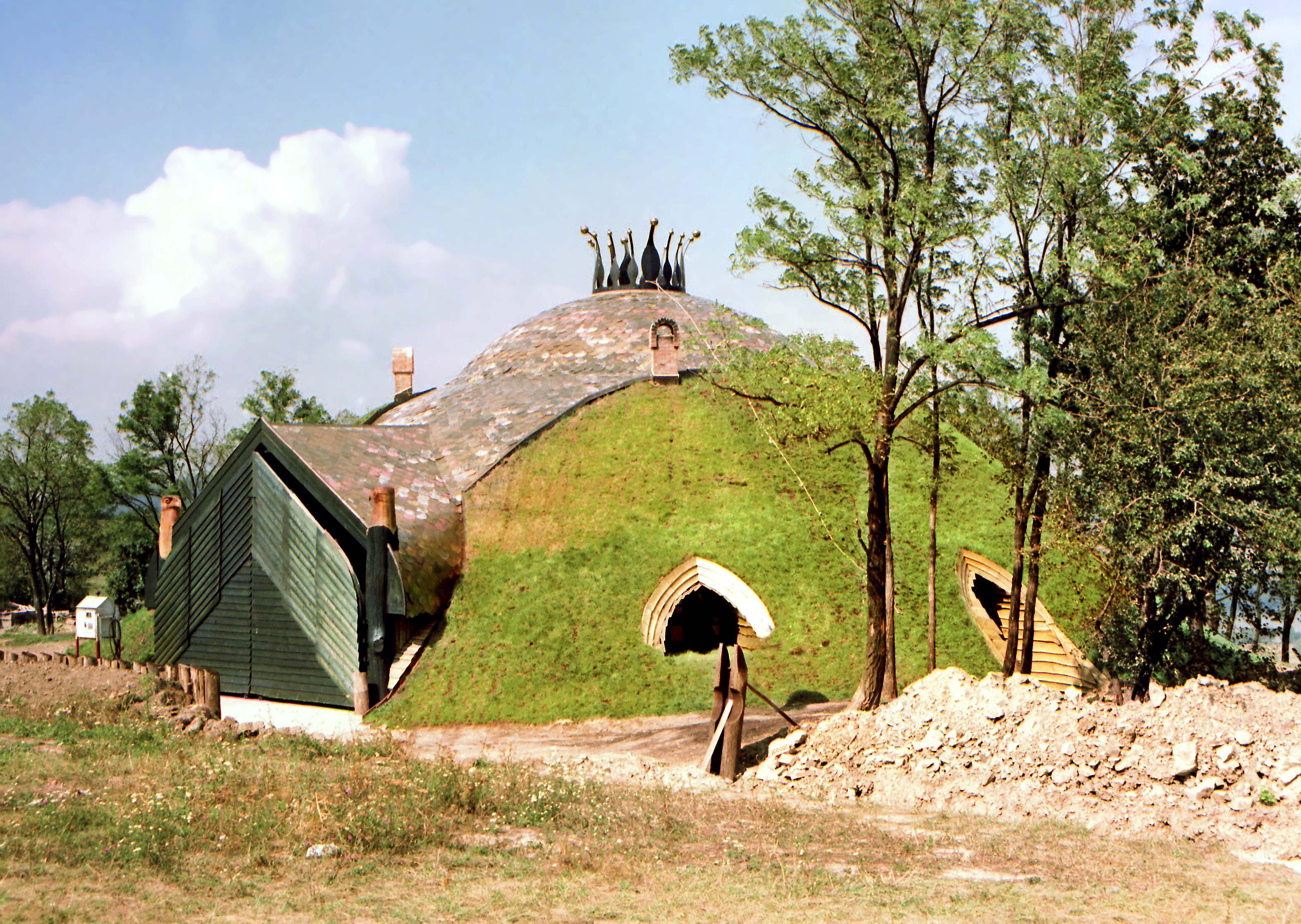 31.08.1986 Visegrad (Ungarn): Pilisi Parkerdö {Parkwald von Pilis}: Grashaus / Erdhaus. Forest Learning Centre (1984). Architekt Imre Makovecz (1935-2011). Eine ungarische Angabe lautet Jahre später: "Erdö Hete - Visegrad-Madas László Erdészeti Erdei Iskola Pilisi Parkerdö Zrt". [R19860831C]19860831460NR.JPG(c)Blobelt